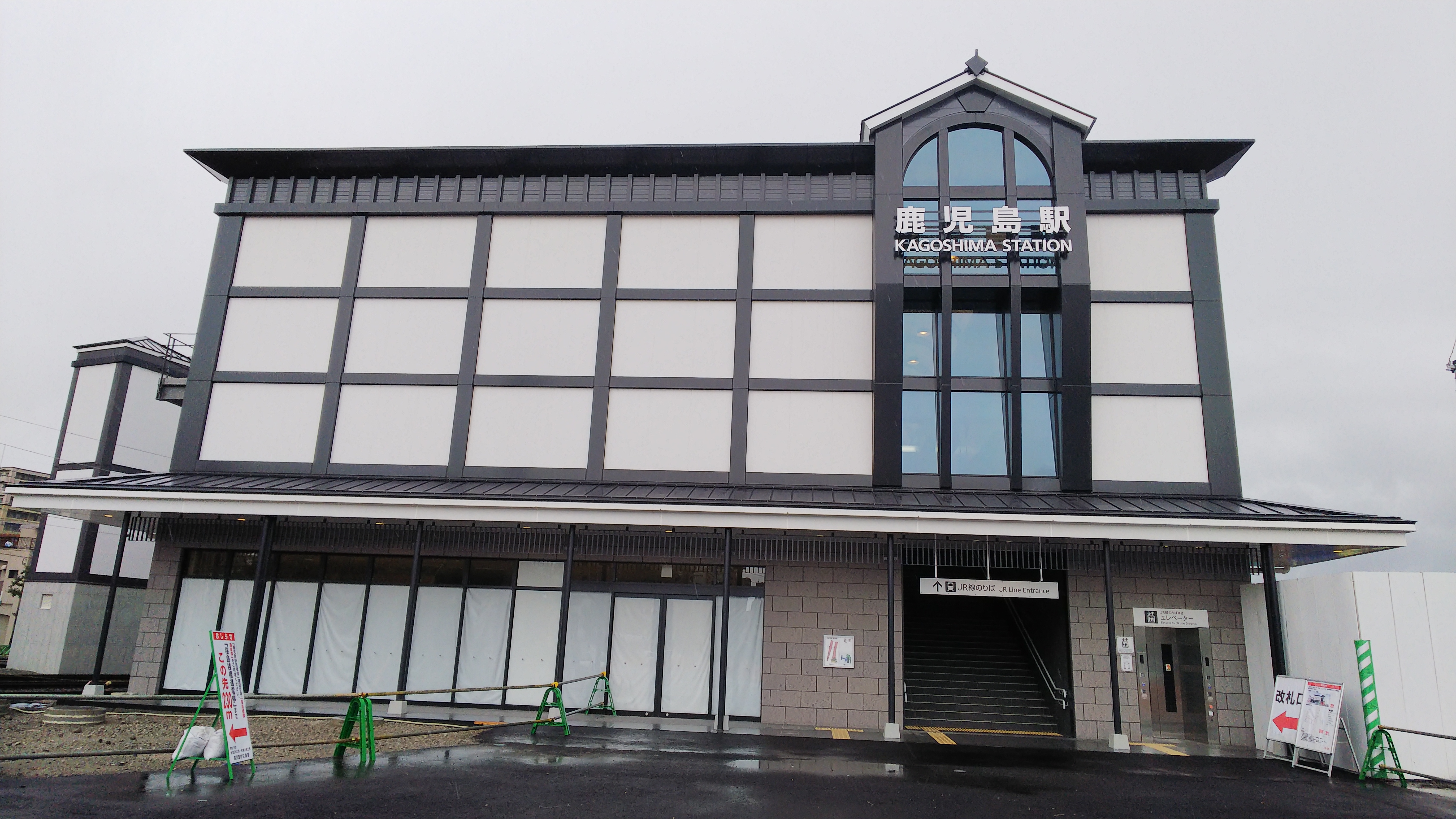 2020年2月15日 供用開始